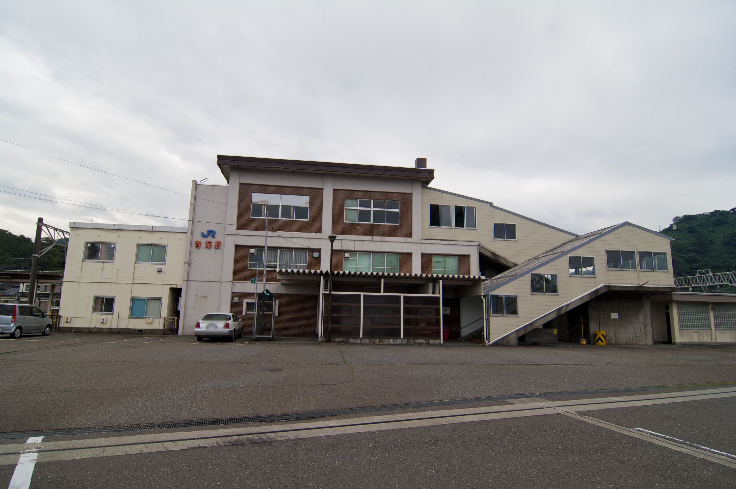 西日本旅客鉄道株式会社北陸本線青海駅